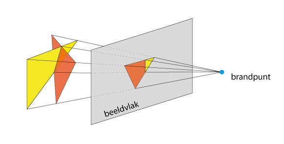 projectielijnen naar brandpunt